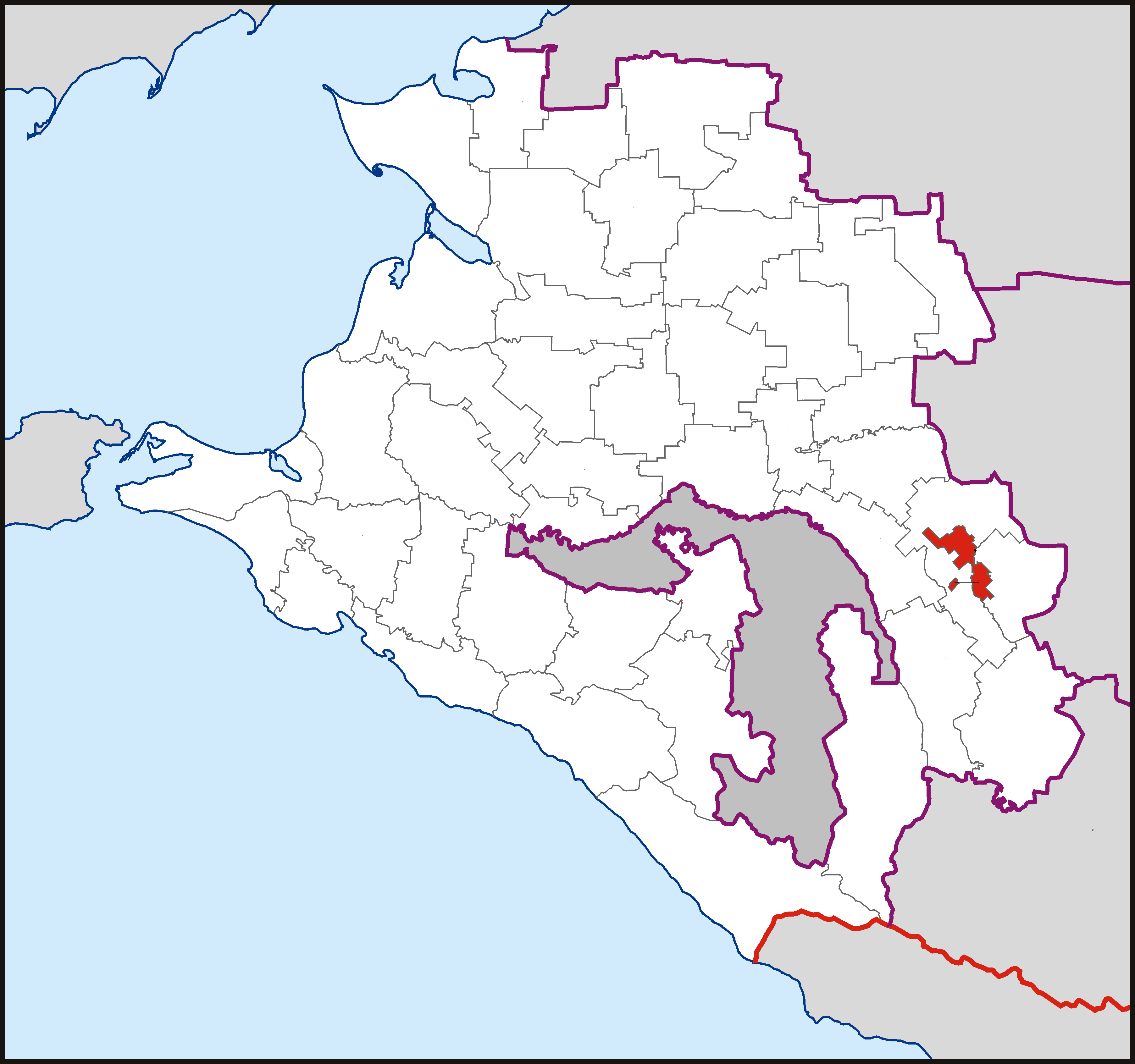 Муниципальное образование "Город Армавир" на карте Краснодарского края